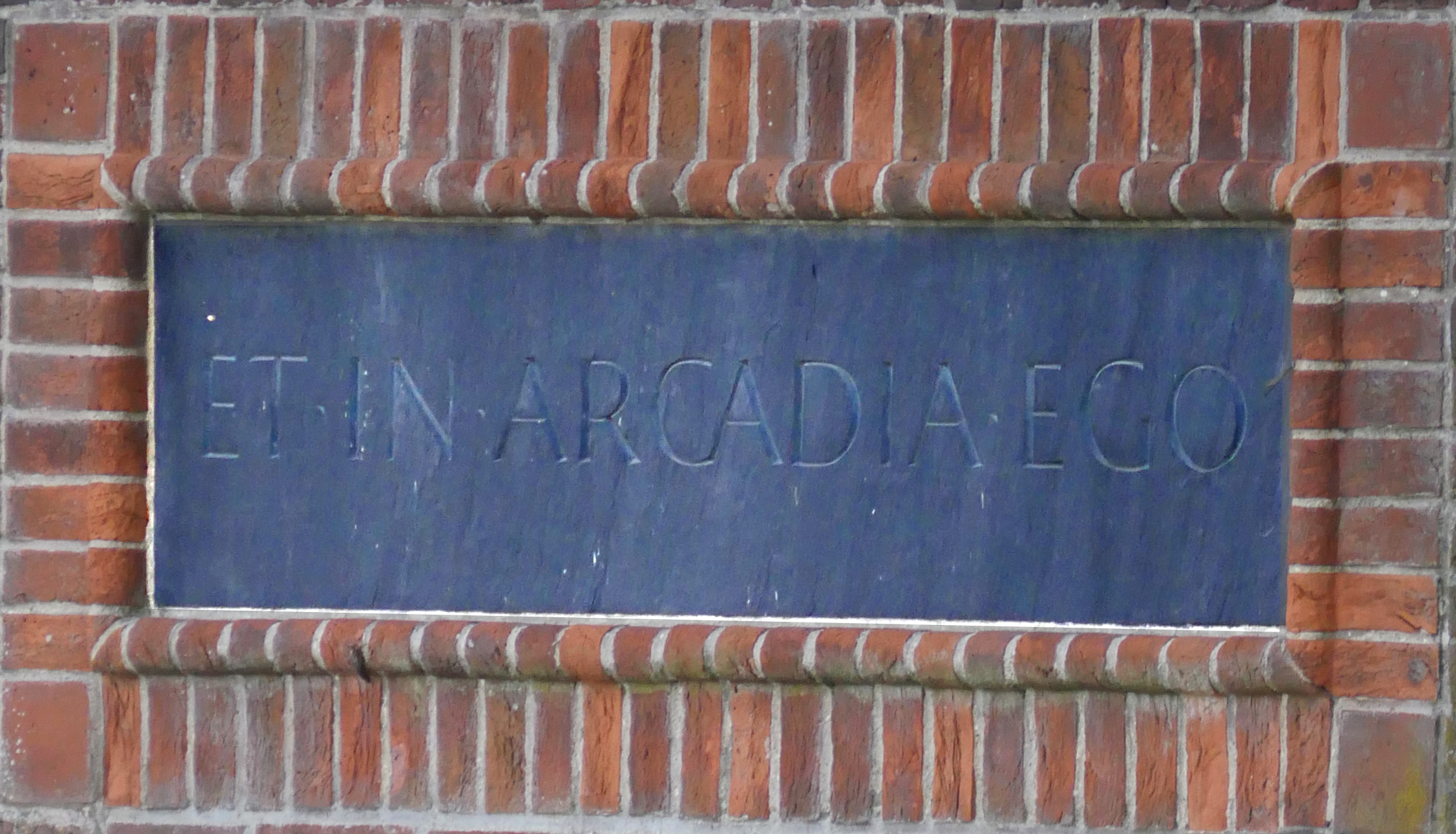 Relief by Ian Hamilton Finlay; Detail uit de foto met de uitstroomopening, met verhoogd contrast om de tekst "et in arcadia ego" beter leesbaar te maken.